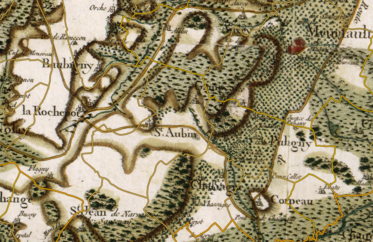 Feuille n° 84 « Autin » de la carte de Cassini, publiée en 1759 à l'échelle 1/86400, centrée sur la commune de Saint-Aubin.